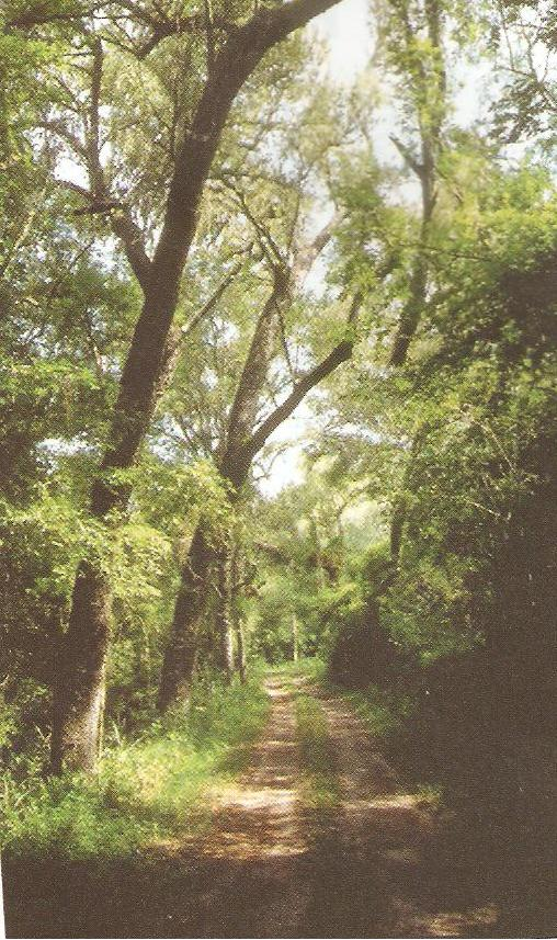 Reserva.